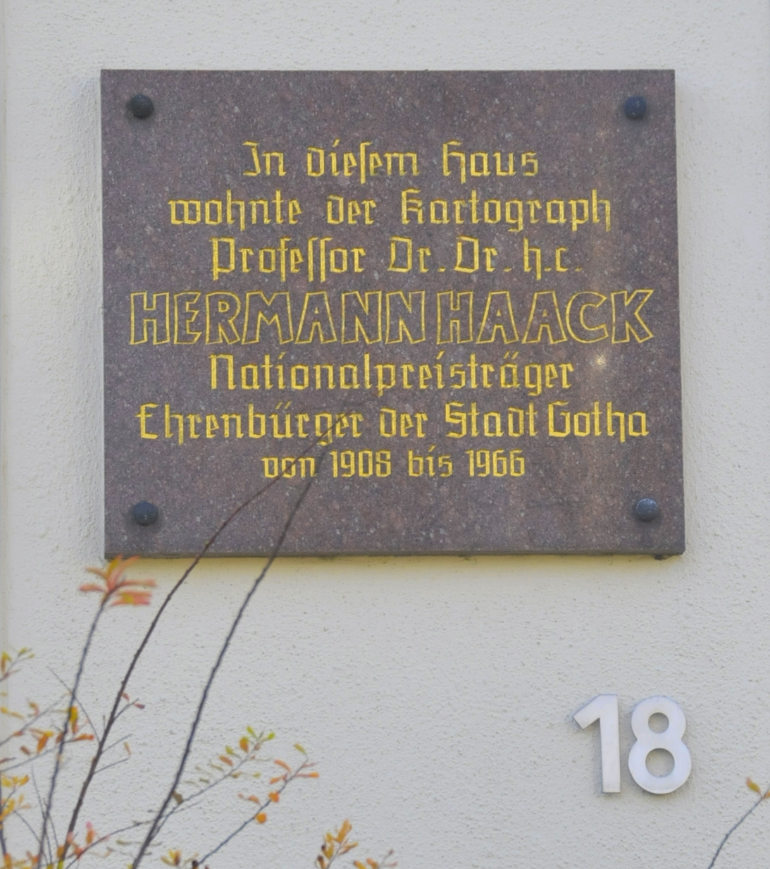 Gotha, Emminghausstr. 18, ehem. Wohnhaus von Herrmann Haack